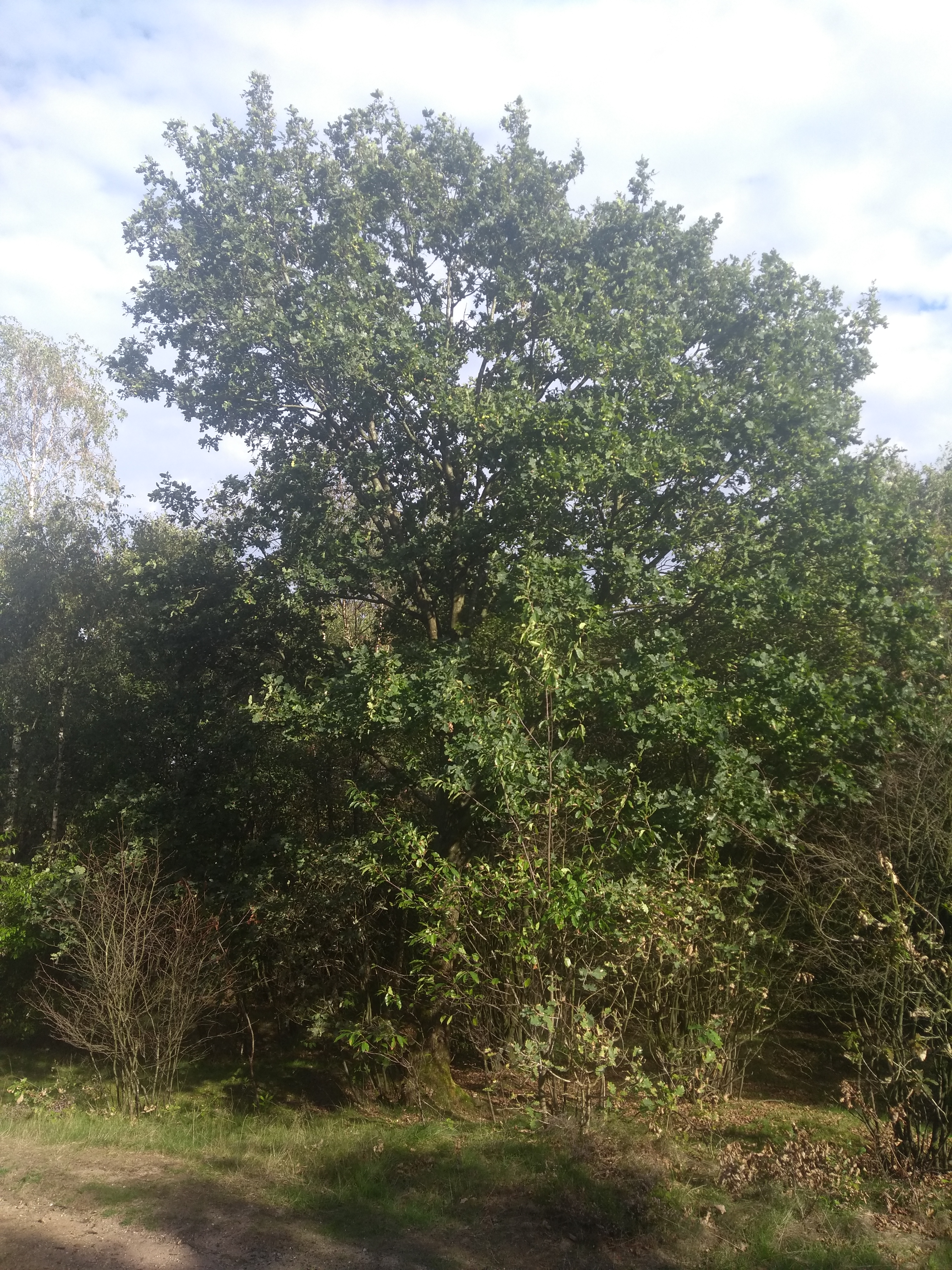 Het hoogste punt van de Woensberg